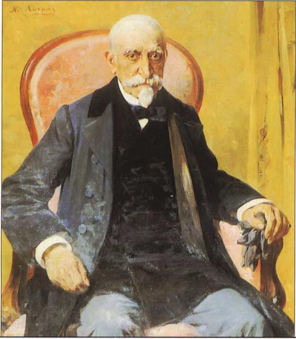 Παύλος Καλλιγάς, νομικός, ιστορικός, λογοτέχνης και πολιτικός.